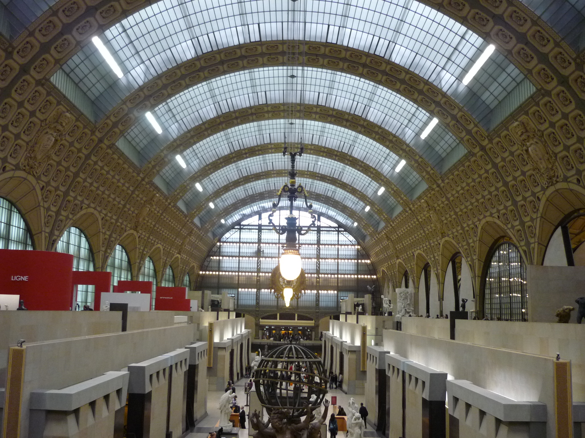 Der Innenraum, eigentlich Halle des deMusée d’Orsay in Paris, Frankreich.